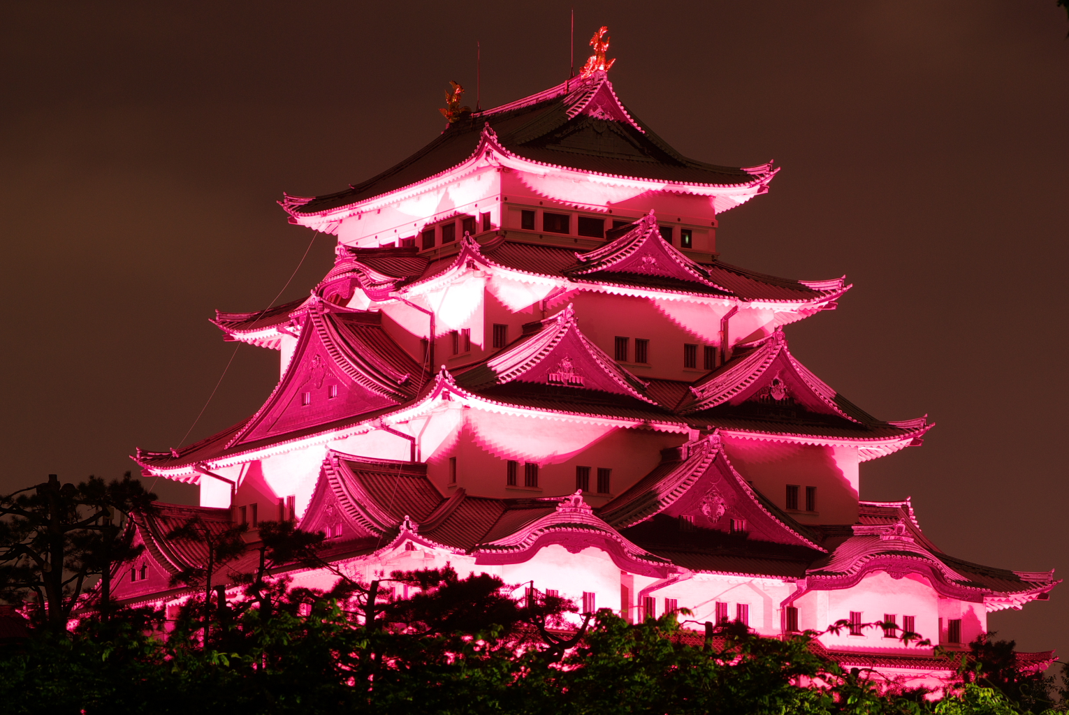 ピンク色にライトアップされた名古屋城。ホワイトバランス：太陽光